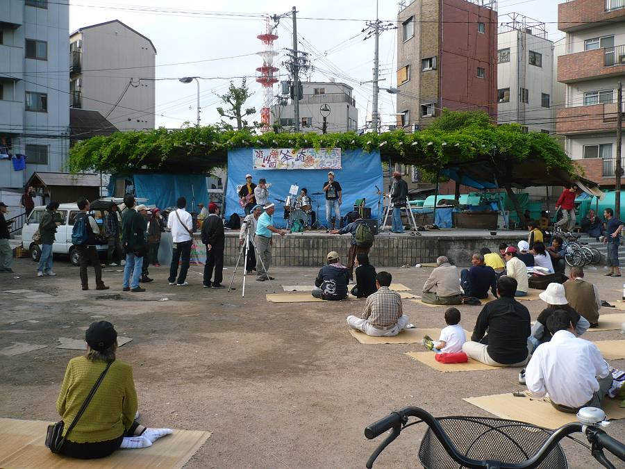 Yotteki Festival